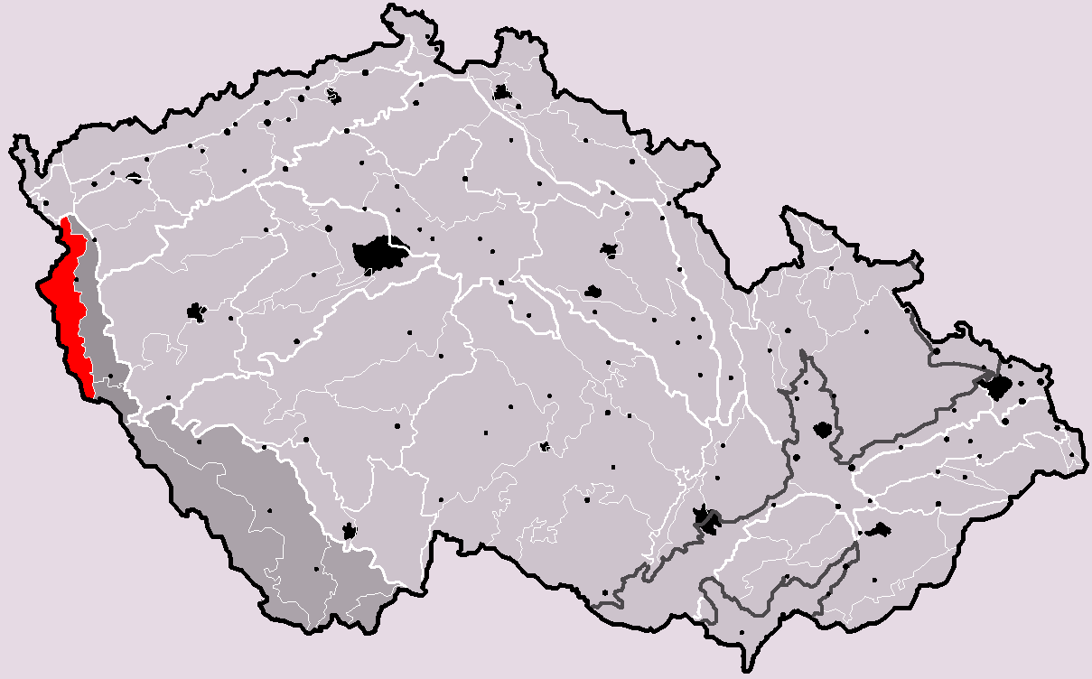 Poloha geomorfologického celku Český les v rámci České republiky. Hercynský systém Hercynská pohoří I Česká vysočina I1 (I) Šumavská subprovincie I1A (IA) Českoleská oblast I1A-1 (IA-1) Český les